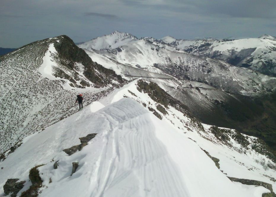 arista mustallar